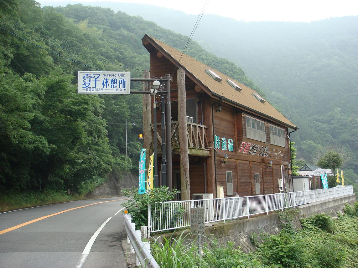 国道193号沿。夏子休憩所